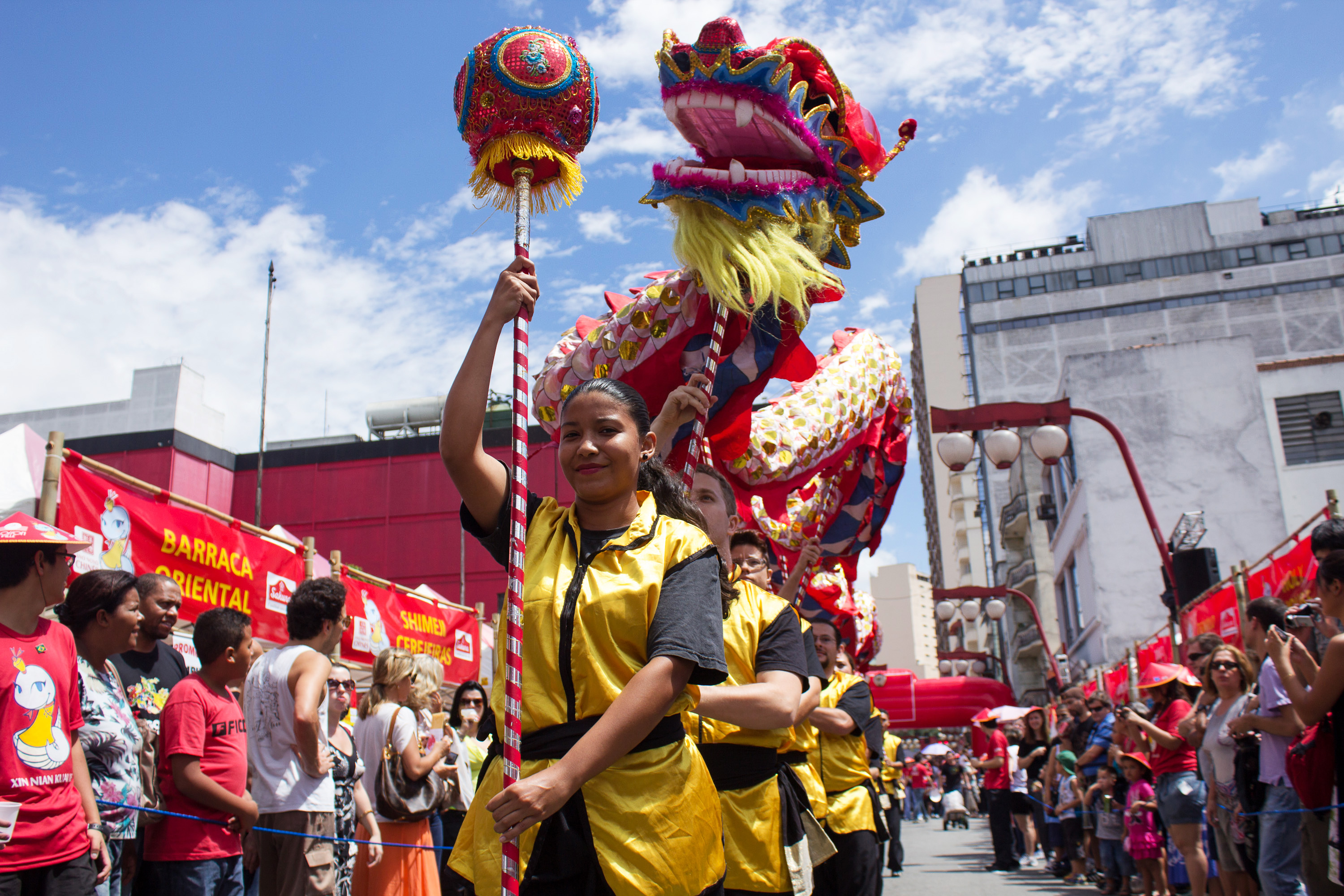 ANO NOVO CHINÊS - LIBERDADE - SÃO PAULO - 02/02/2013 - O ano novo chinês que é celebrado no bairro da Liberdade na região central da capital paulista, celebra sua 8ª edição no ano de 2013, o evento contou com a presença de autoridades políticas da China, Taiwan e com a do prefeito de São Paulo Fernando Haddad. Foto: Jrdiel Carvalho/CPN